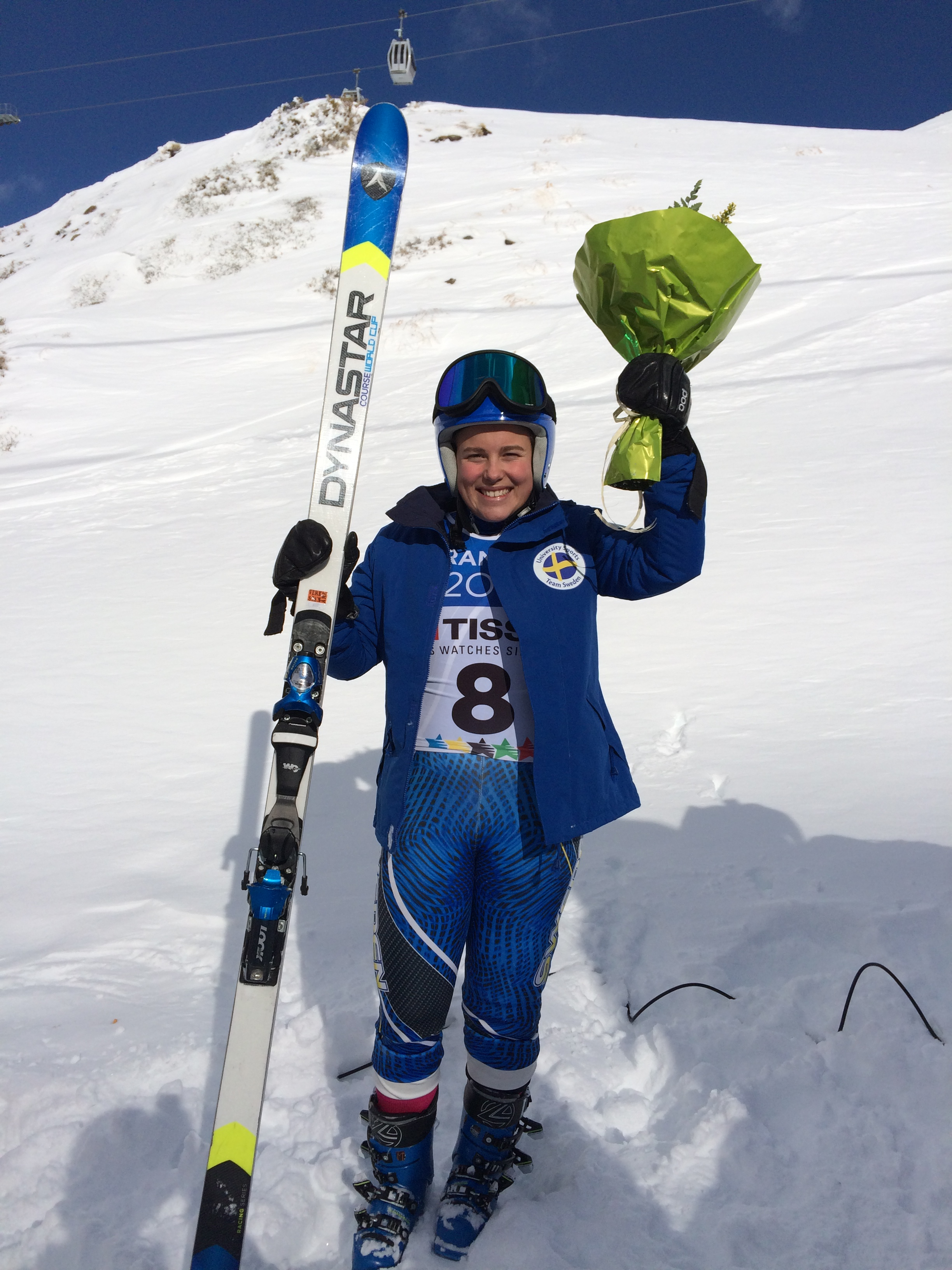 Helena Rapaport efter sitt brons i super-G på Universiaden i Granada 2015.